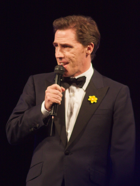 Rob Brydon